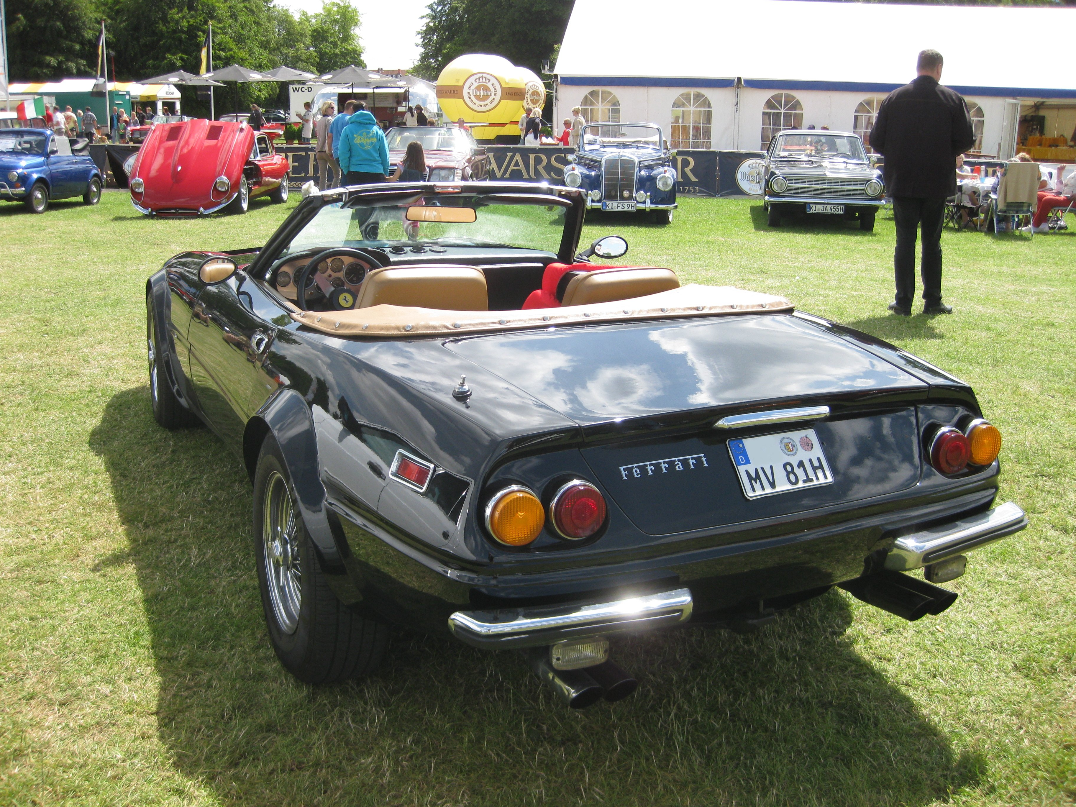 Einer von fünf Replikas Ferrari 365 Spider der TV-Serie Miami Vice